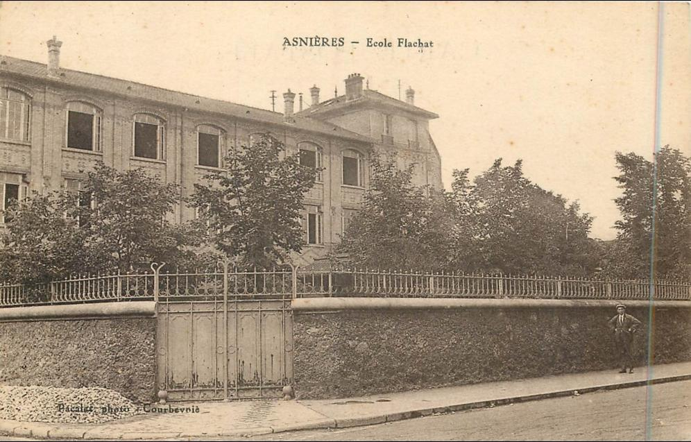 Ecole Flachat, Asnières-sur-Seine